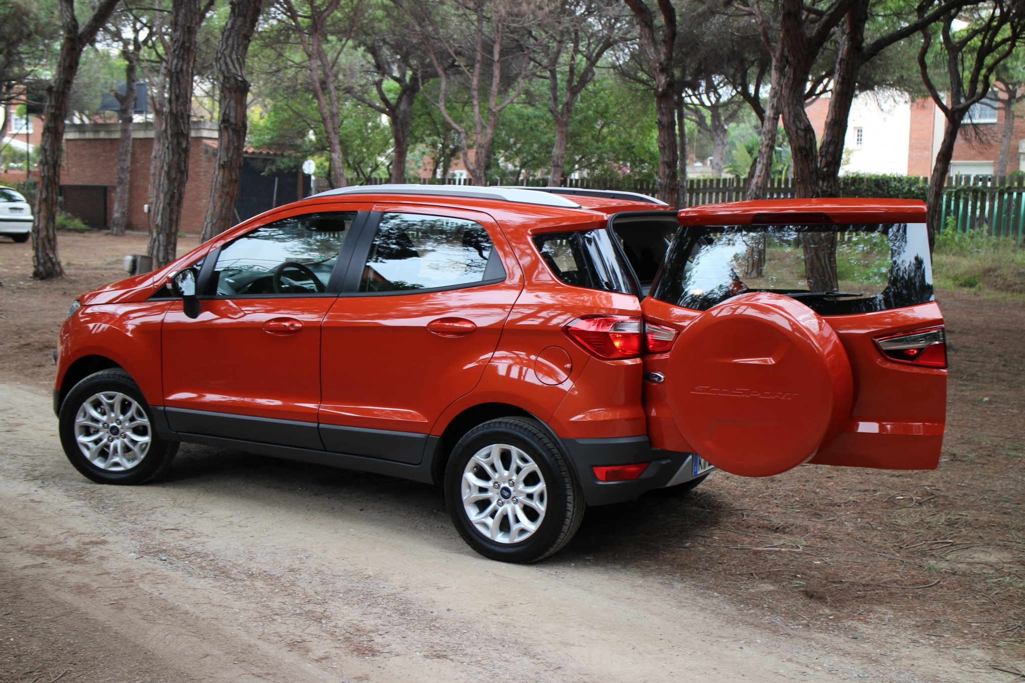 Ford EcoSport Diesel 2013